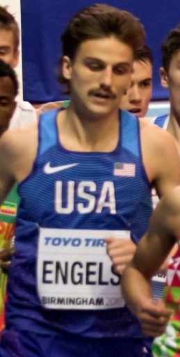 WK040129 finale 1500m